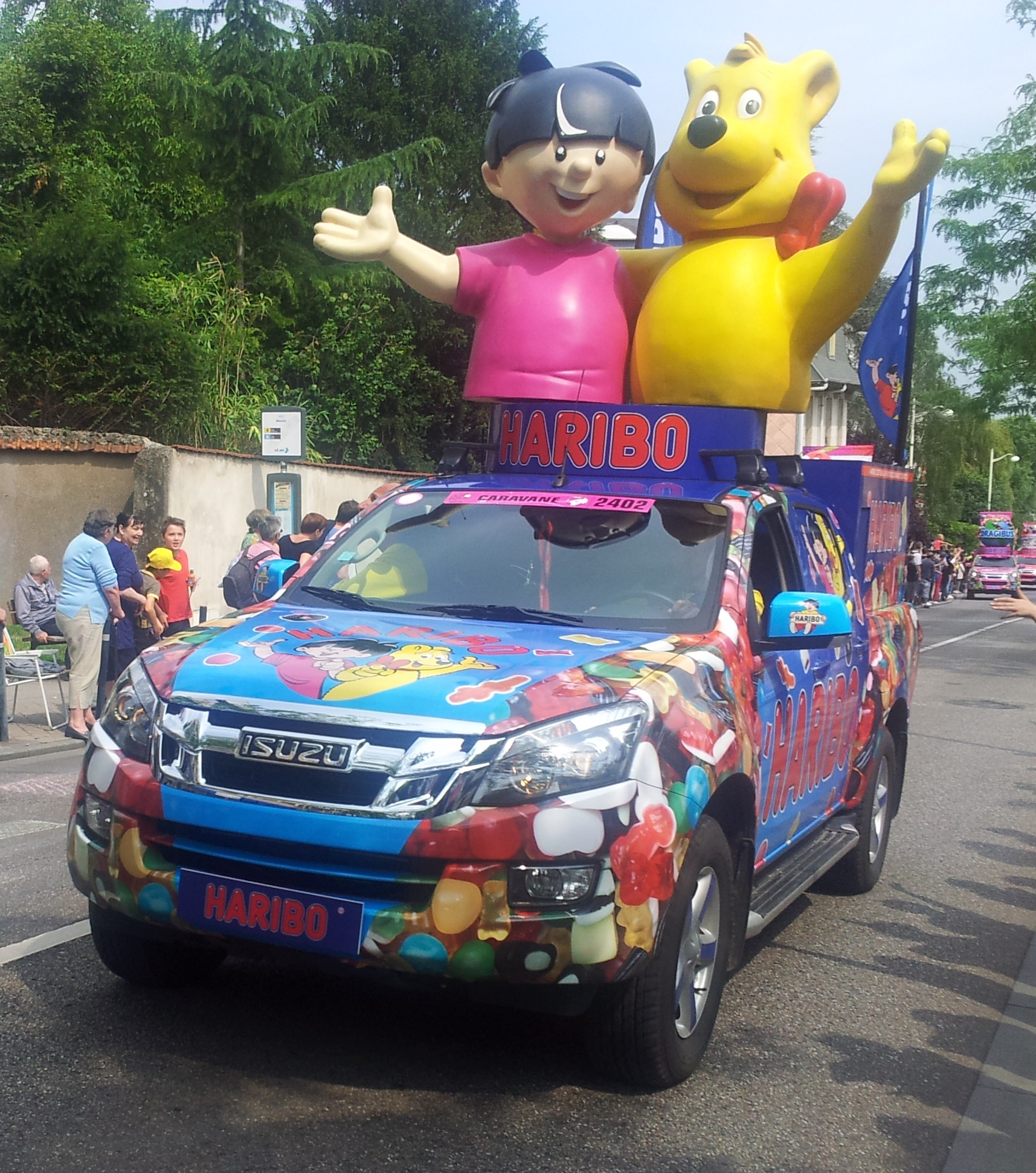 Véhicule de la caravane du Tour de France 2014 dans la côte de Boufflers à Nancy (7e étape).